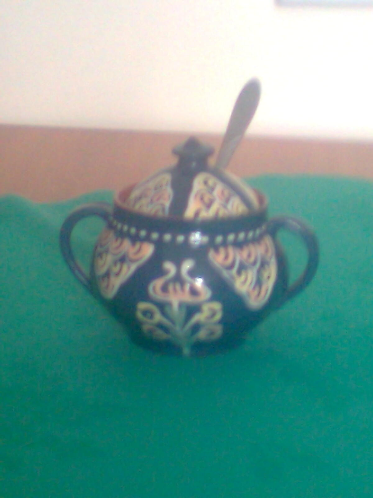 Cukiernica